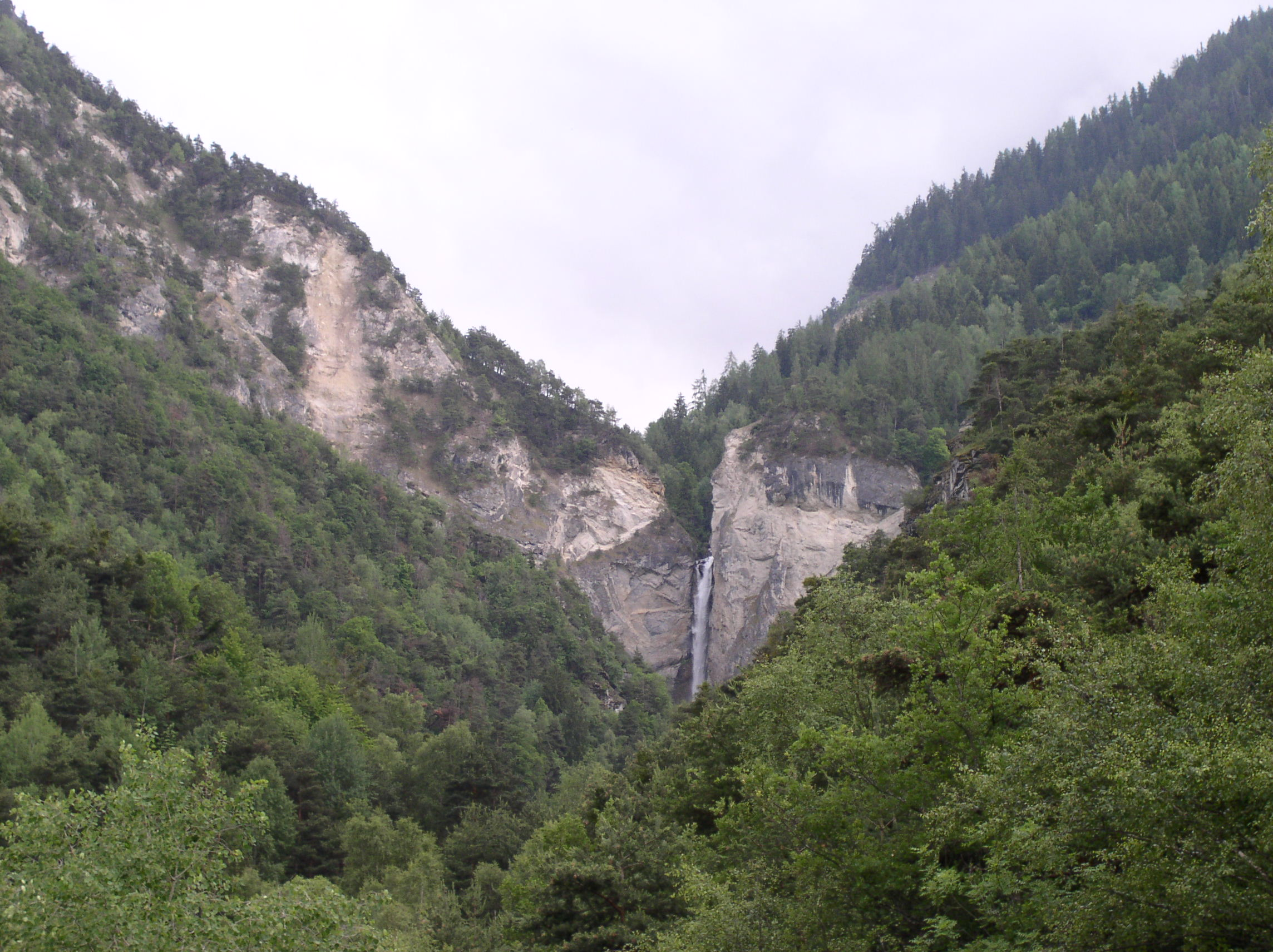 Vallon de Réchy, Valais, Switzerland